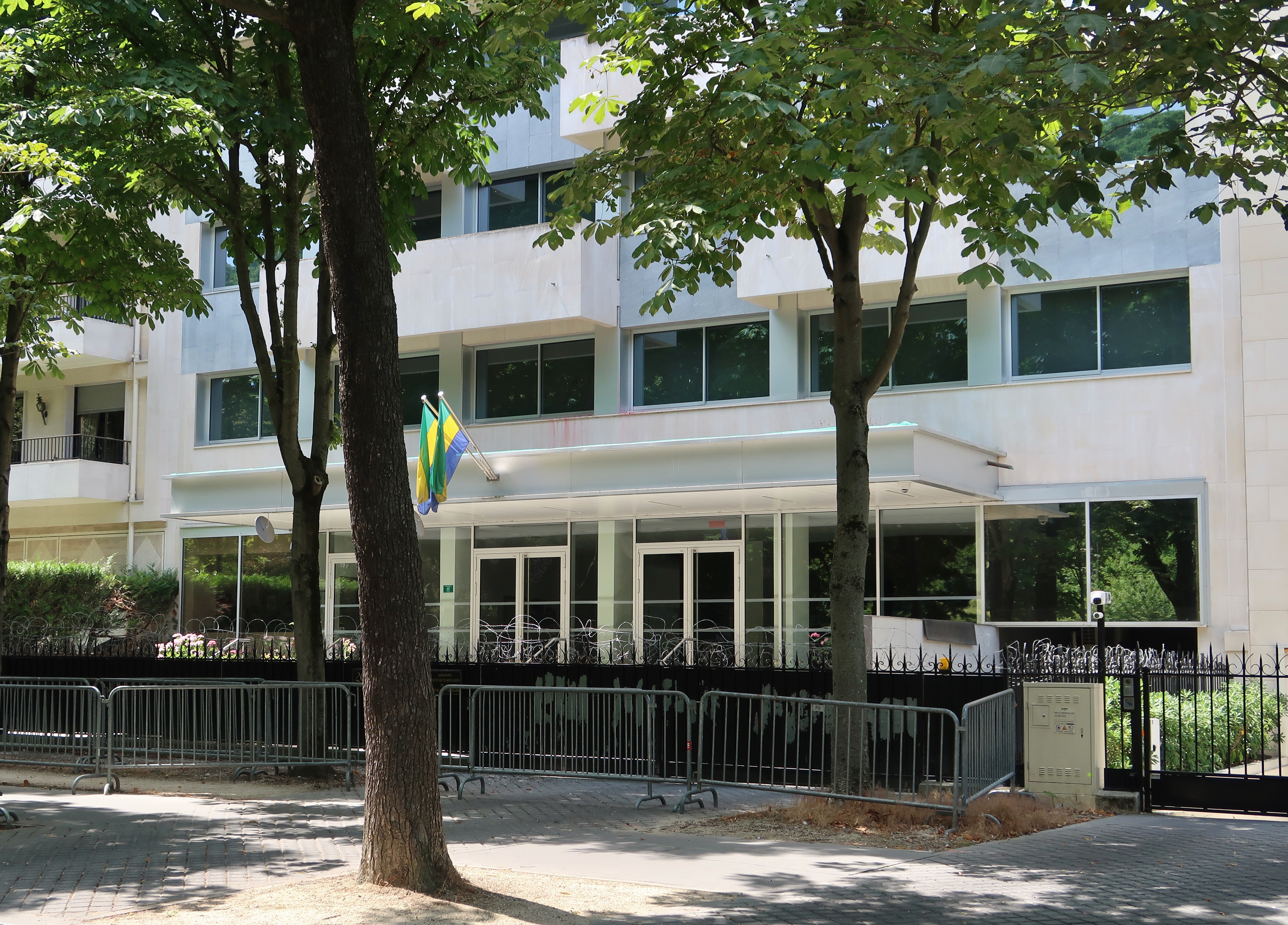 Ambassade du Gabon en France, 26 bis avenue Raphaël (Paris, 16e).